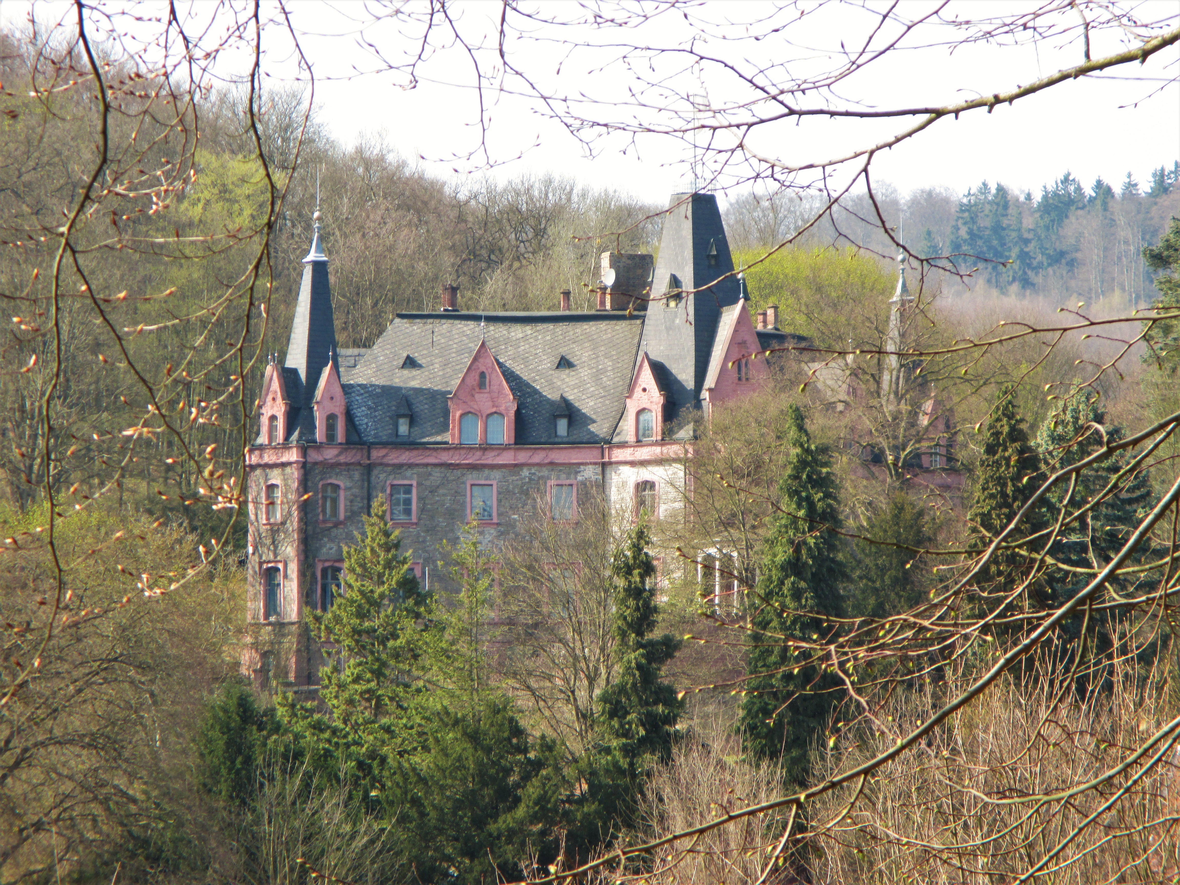 Neues Schloss in Morungen, Stadt Sangerhausen.